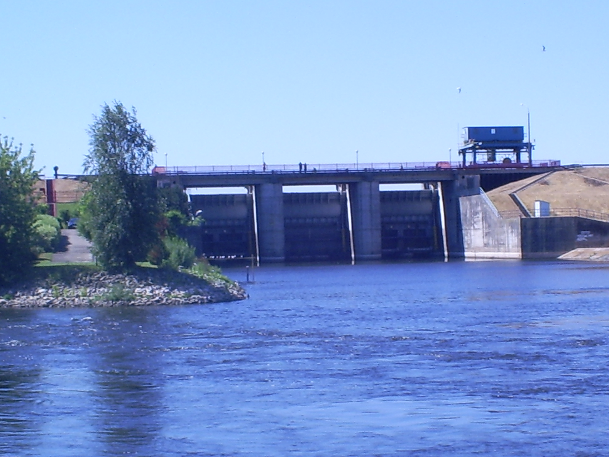 Хидроелектрана на вештачком језеру Језиорско. Варта истиче из хидроелектране. Hydroelectric powerplant on reserwoar Jeziorsko.